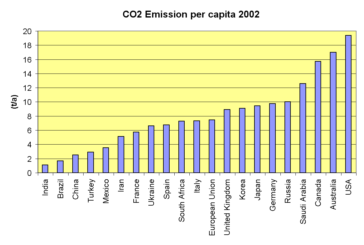 CO2 emission 2002